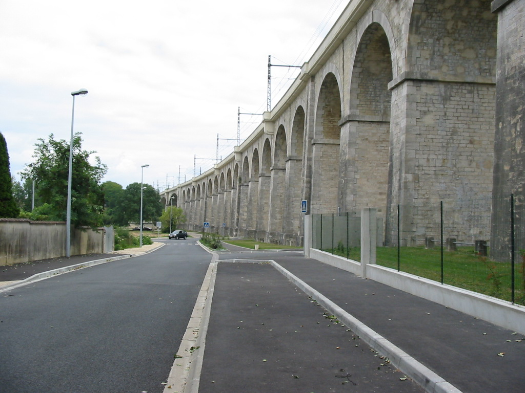 Le viaduc du chemin de fer au dessus du Loing, rue du Viaduc, Veneux - Les Sablons, Seine-et-Marne, France